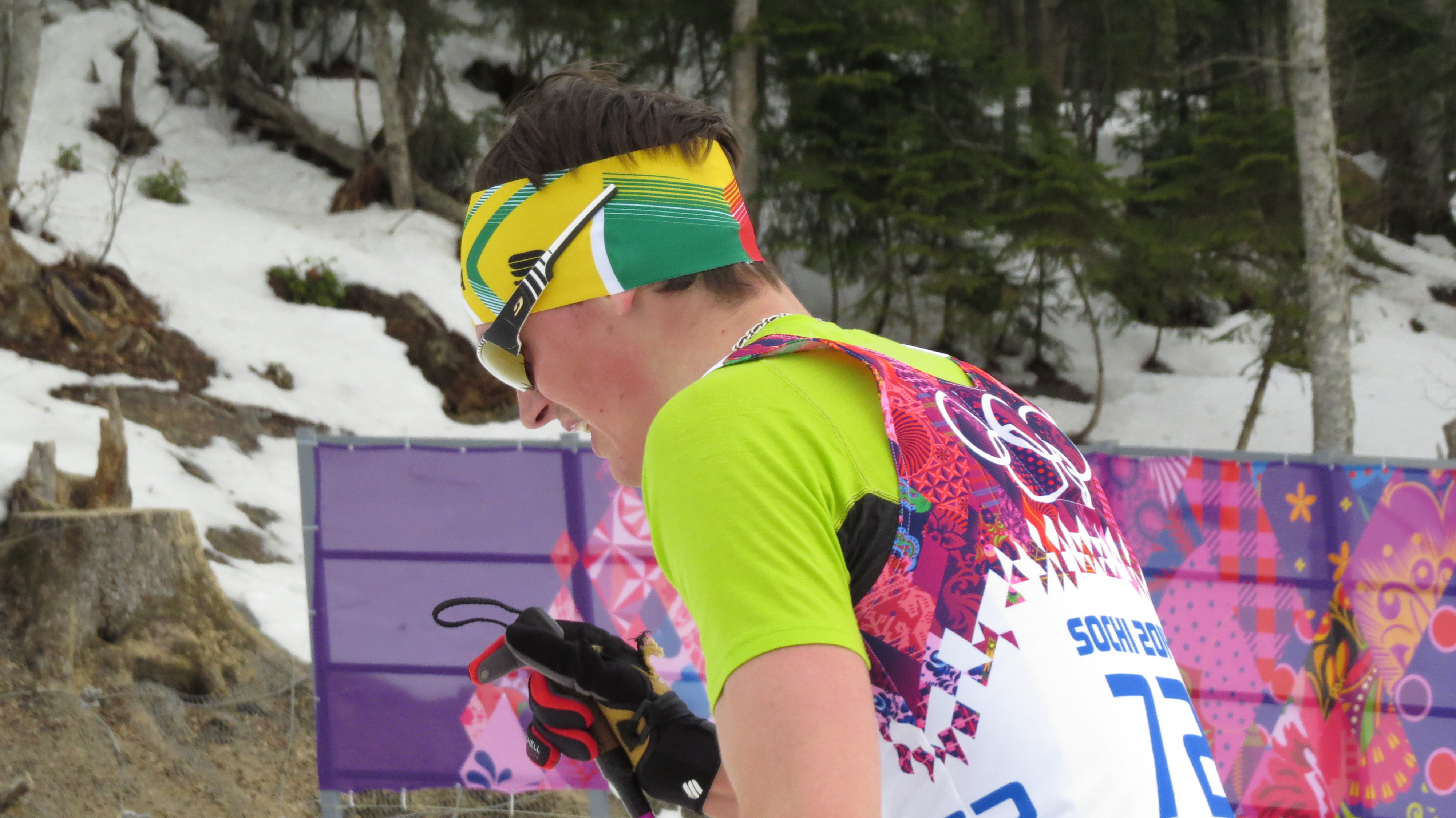 Лыжные гонки на зимних Олимпийских играх 2014 — 15 км классическим стилем (мужчины)